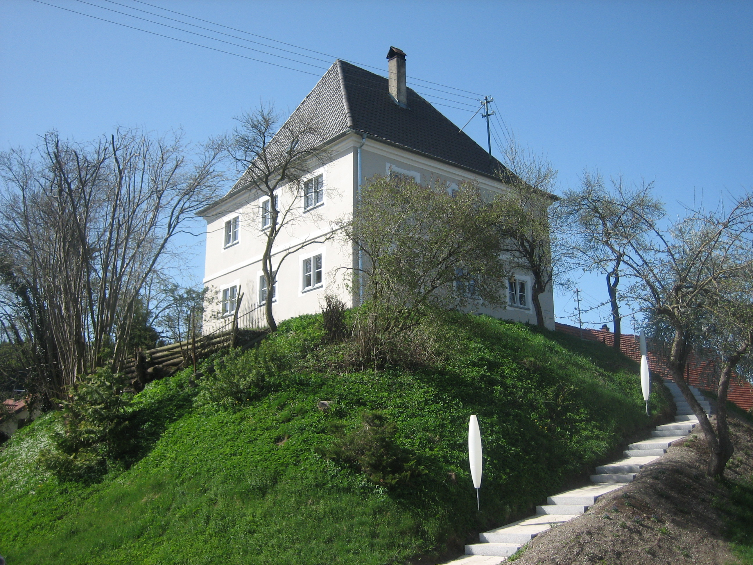 Schlößle in Woringen, Bayern